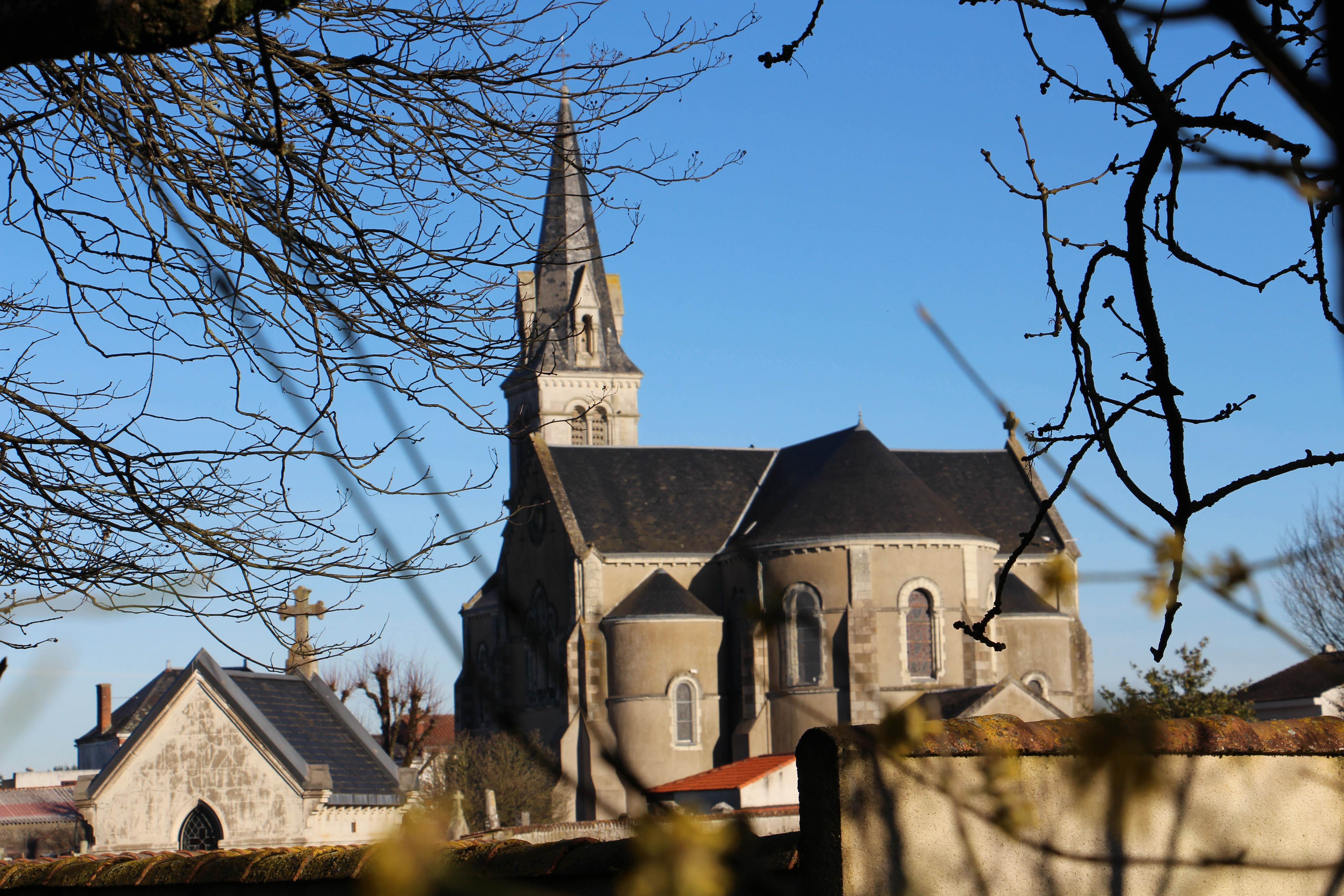 Au centre du bourg, l’église dédiée à Notre Dame, fut construite d’après les plans de M. CLAIR, architecte départemental en 1870.